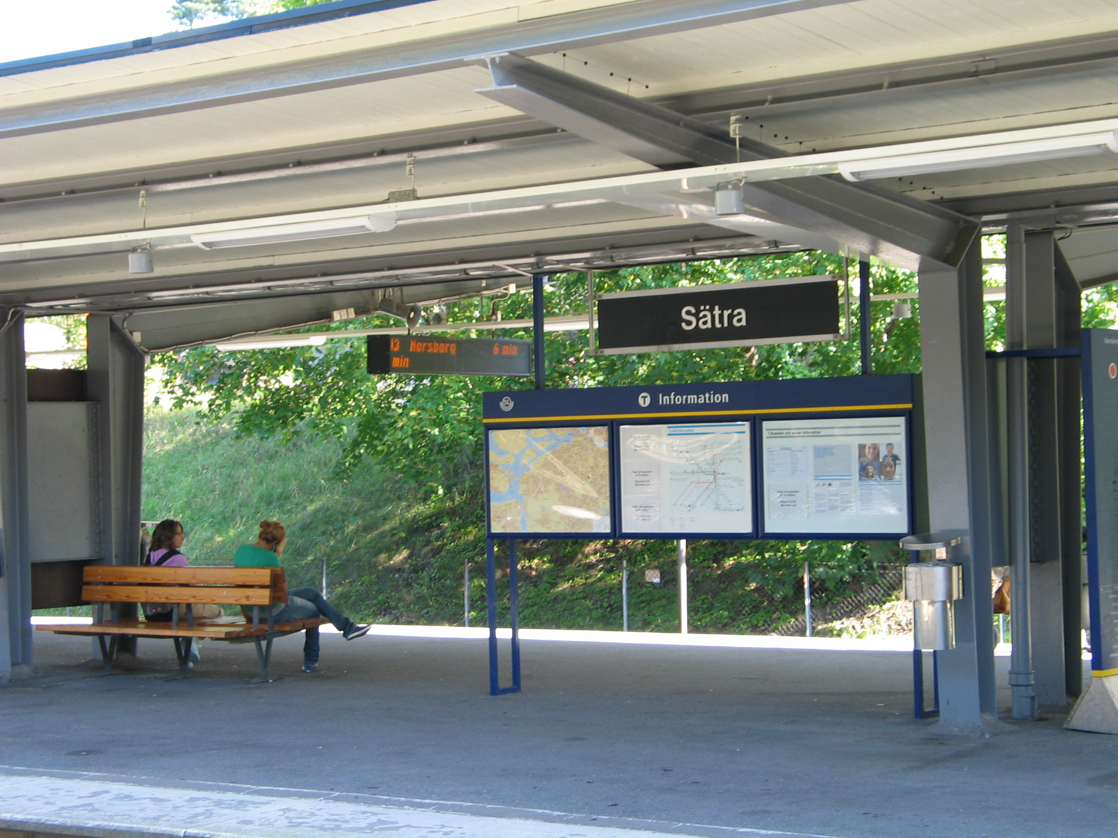 Sätra, a metro station in Stockholm, Sweden.